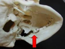 Vista desde caudal el movimiento de lateralidad mandibular hacia la derecha. La flecha indica la zona del compromiso, lado izquierdo